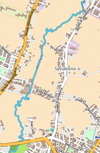 Mappa della frazione Saviabona a Viceza